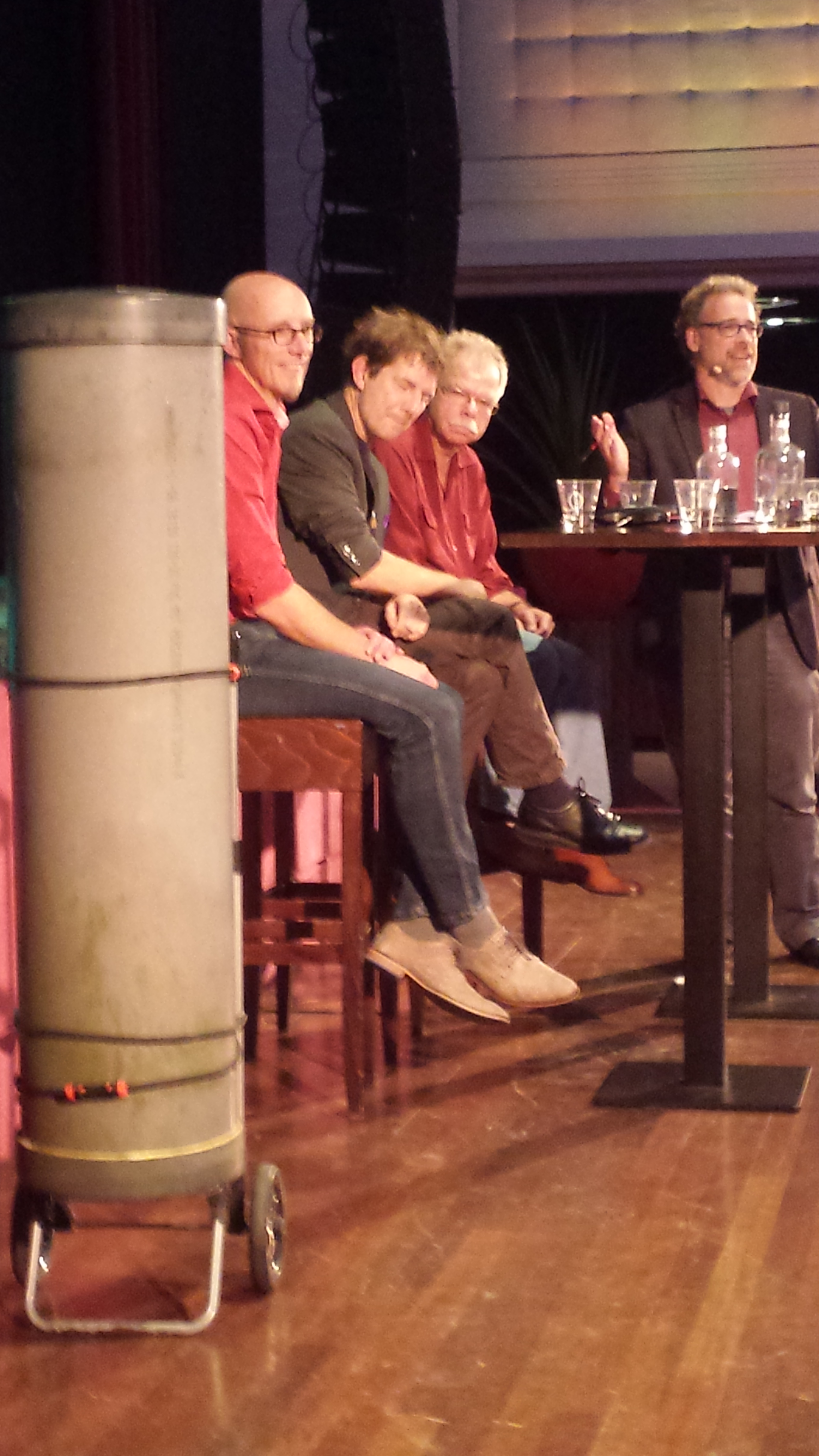 Een 'broncorrector' wordt getoond. Skepsis Congres 2015, Nieuwe Buitensociëteit Zwolle.